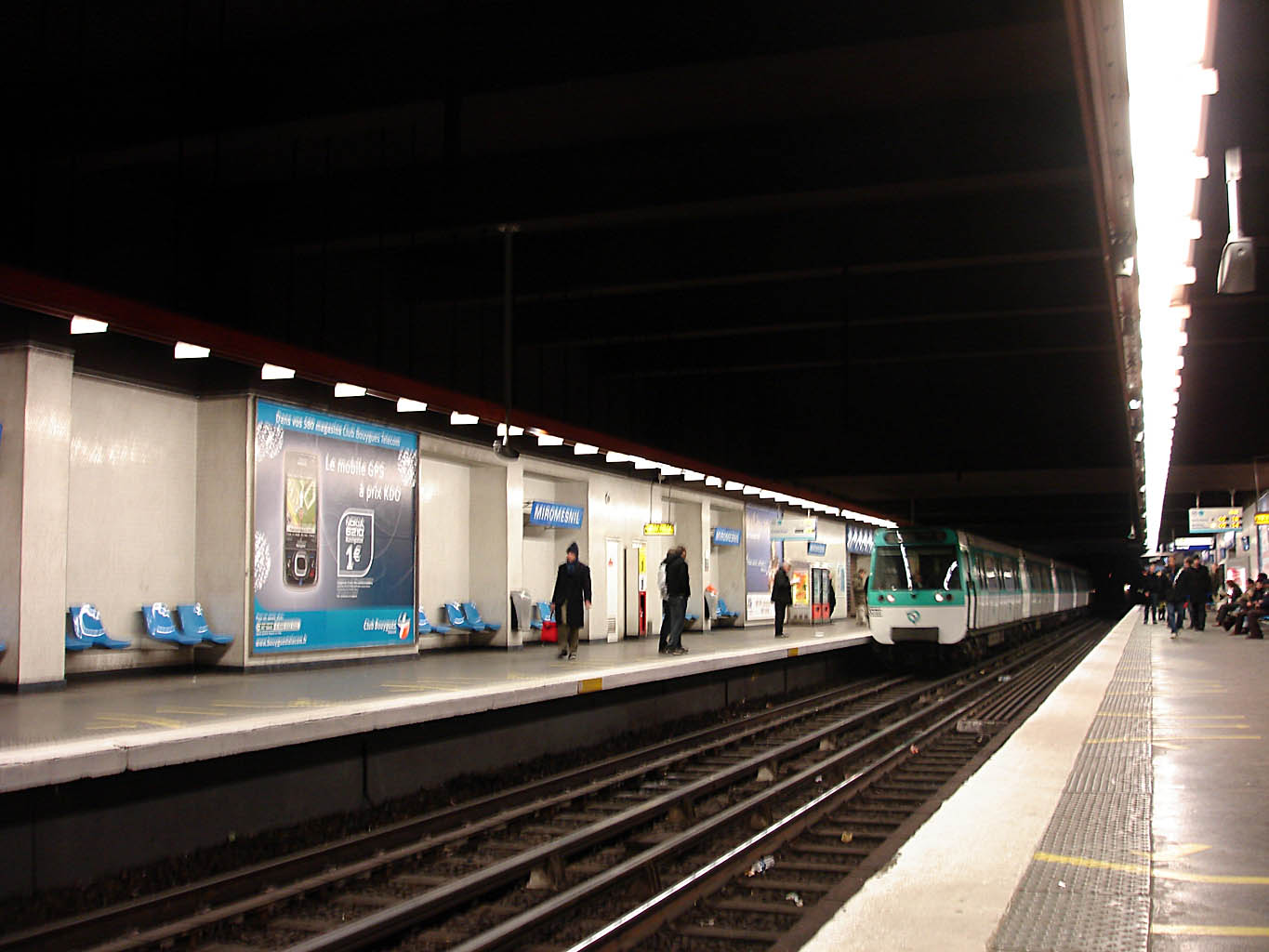 Station Miromesnil de la ligne 13 du métro de Paris, France.